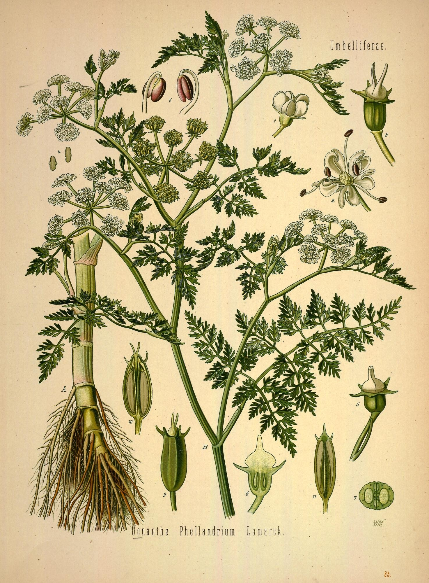 Große Wasserfenchel. A B Theile der Pflanze in nat. Grösse; 1 Blüthenknospe, vergrössert; 2 Blüthe, desgl.; 3 Staubgefässe, desgl.; 4 Pollen, desgl.; 5 Kelch mit Stempel, desgl.; 6 Stempell im Längsschnitt, desgl.; 7 Fruchtknoten im Querschnitt desgl.; 8 junge Frucht, desgl.; 9 reife Frucht, desgl.; 10 und 11 dieselbe im Längsschnitt, desgl.